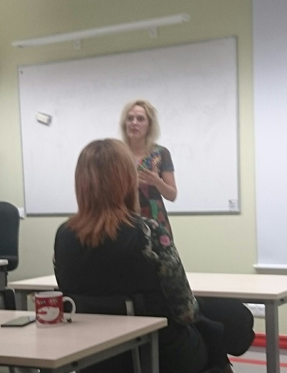 Vilja Kiisler esinemas Tõnu Luigele pühendatud ettekandepäeval Tartu Ülikoolis, 2. detsember 2016.